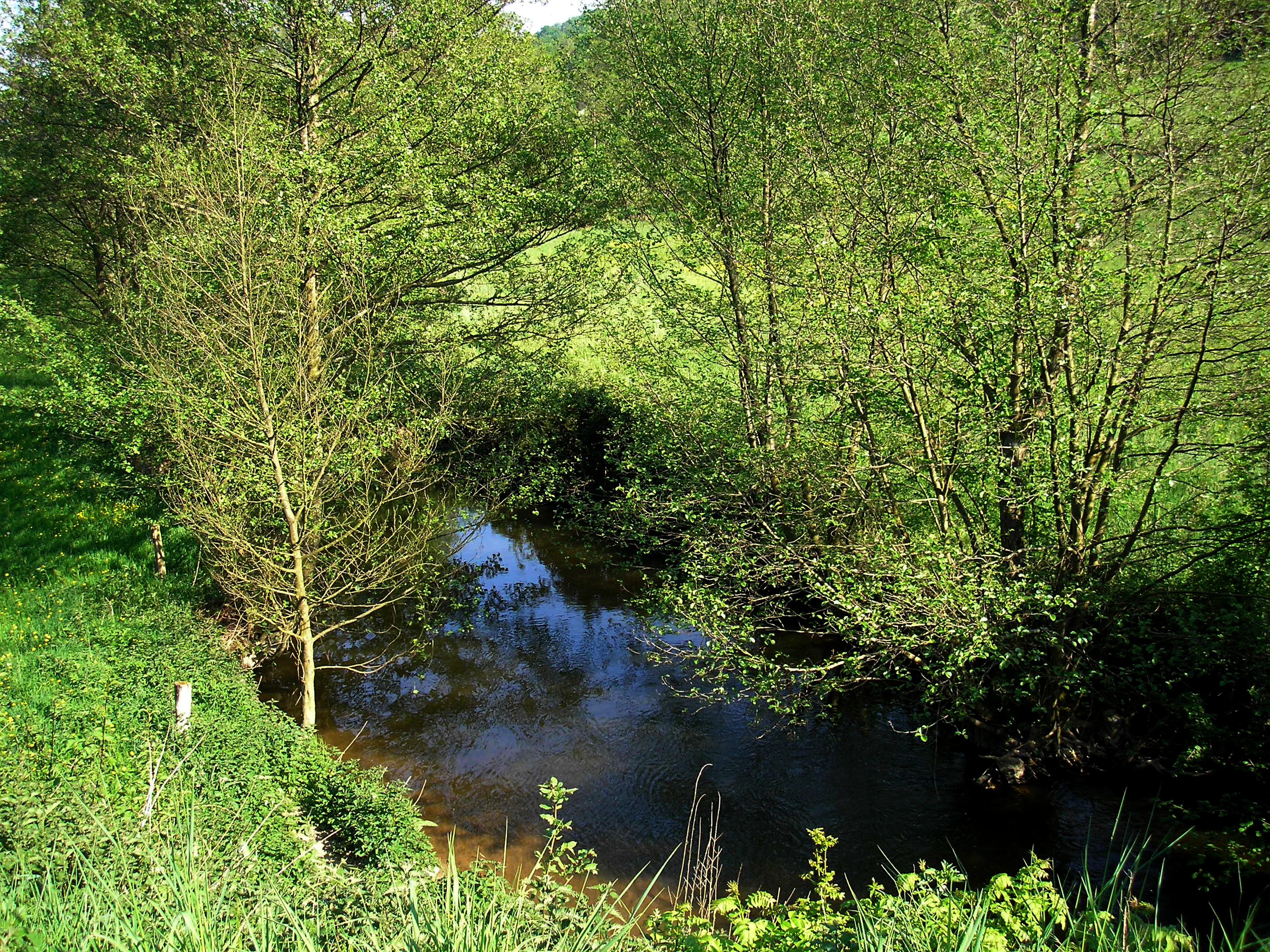 Lénault et Saint-Vigor-des-Mézerets (Normandie, France). La Druance à la limite des communes de Lénault (à gauche) et Saint-Vigor-des-Mézerets (à droite).